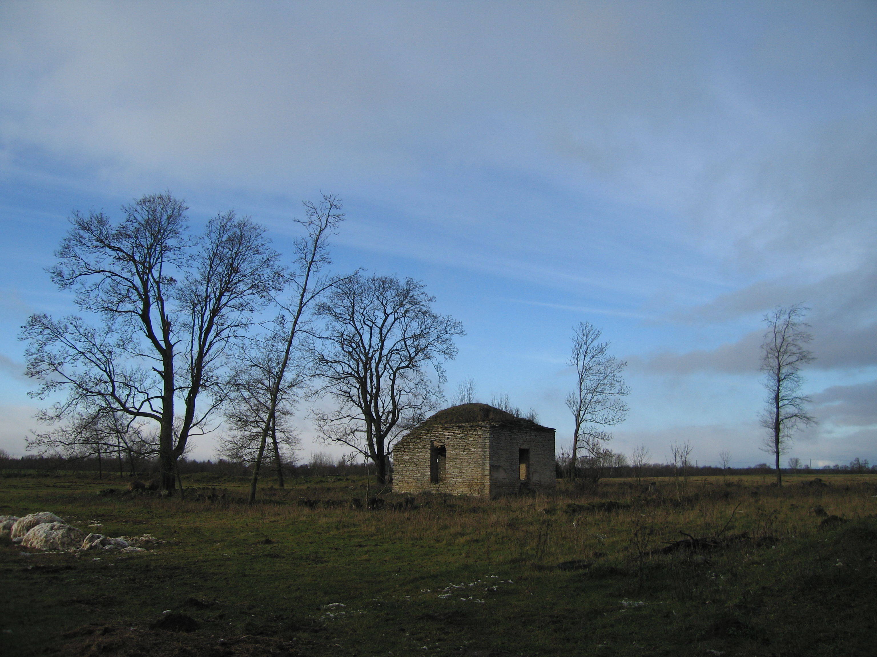 Rägavere mõisa kalmistu üldvaade